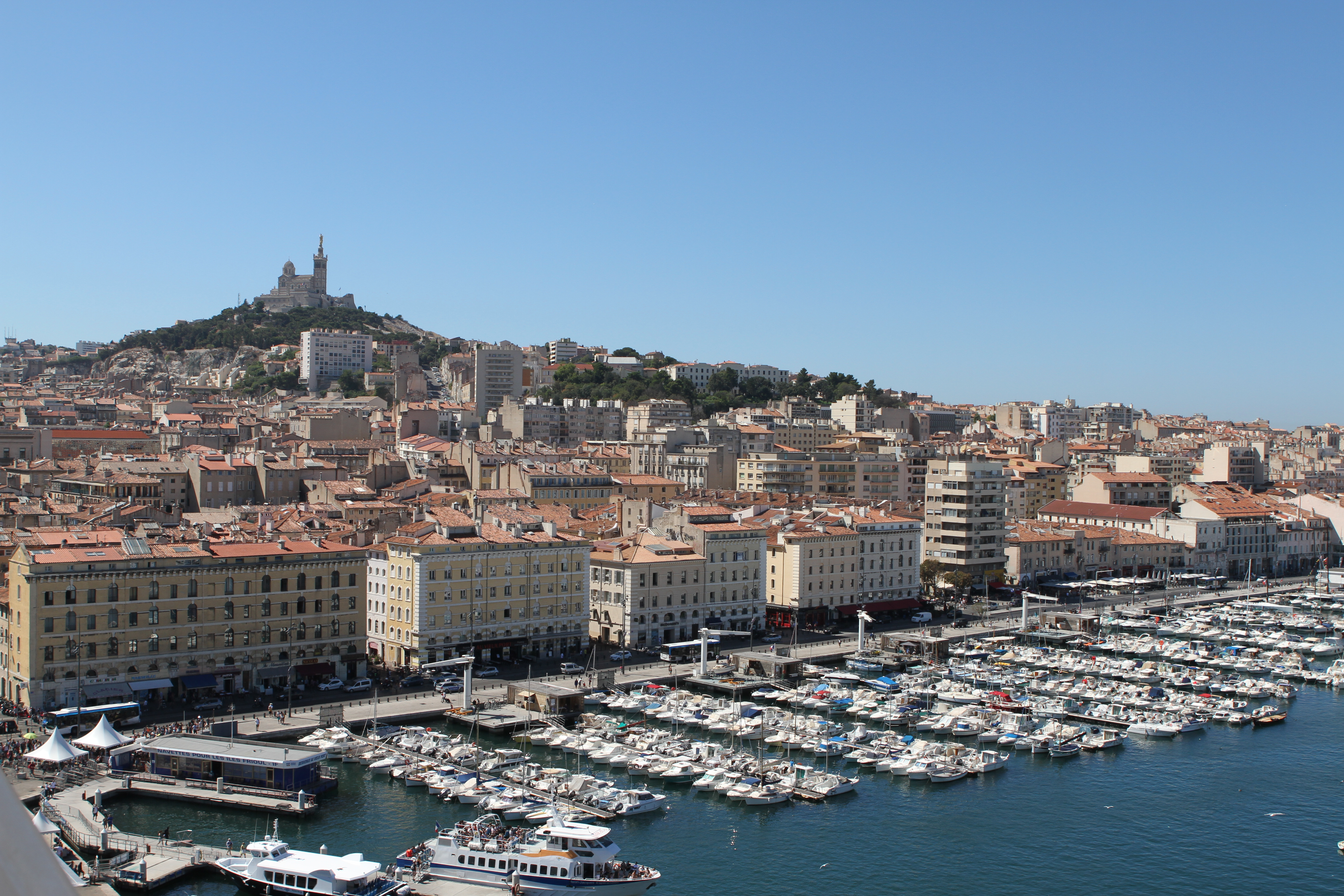 Vue sur le Vieux-Port depuis la grande roue (Marseille, France)